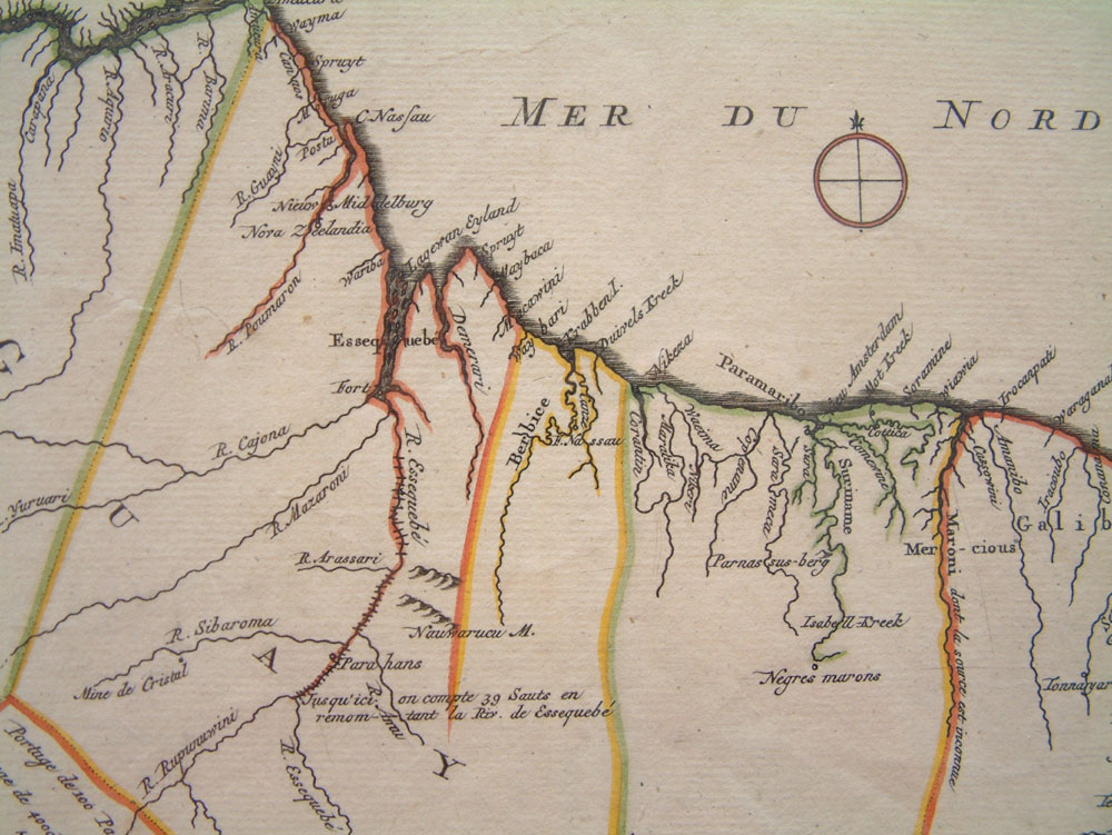 foto van oude landkaart, ik heb deze foto zelf gemaakt.